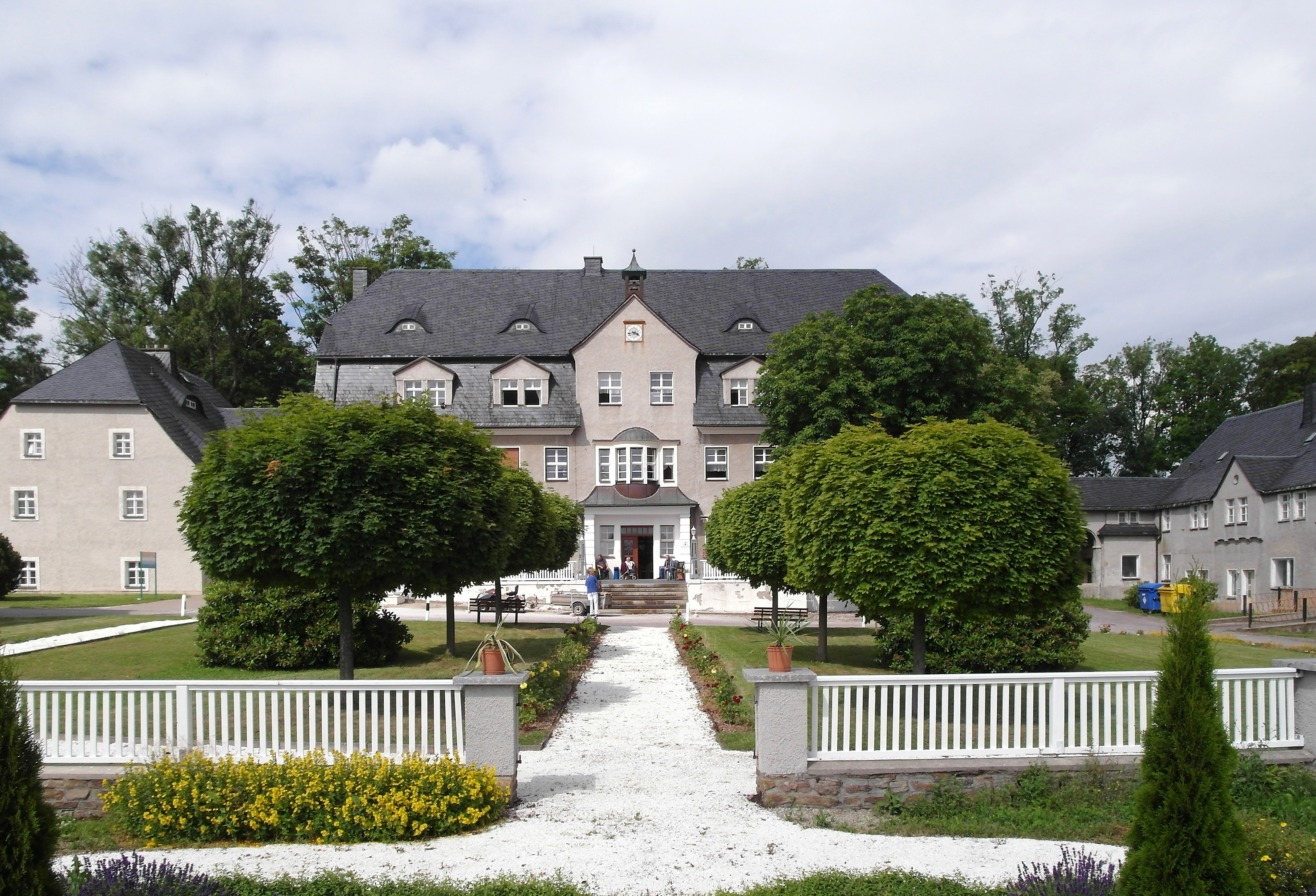 18.07.2016 09509 Wernsdorf (zu Pockau-Lengefeld): Rittergut Wernsdorf. Nach dem Brand von 1798 ließ Christian Gotthelf Clausnitzer ein neues Herrenhaus errichten. 1913/14 wurde dieses für Dr. Johannes Reinecker in einen schloßartigen Landsitz umgebaut. Seit der Enteignung 1945 wird das Schloß als Altersheim genutzt. [SAM7119.JPG] 20160718710DR.JPG(c)Blobelt